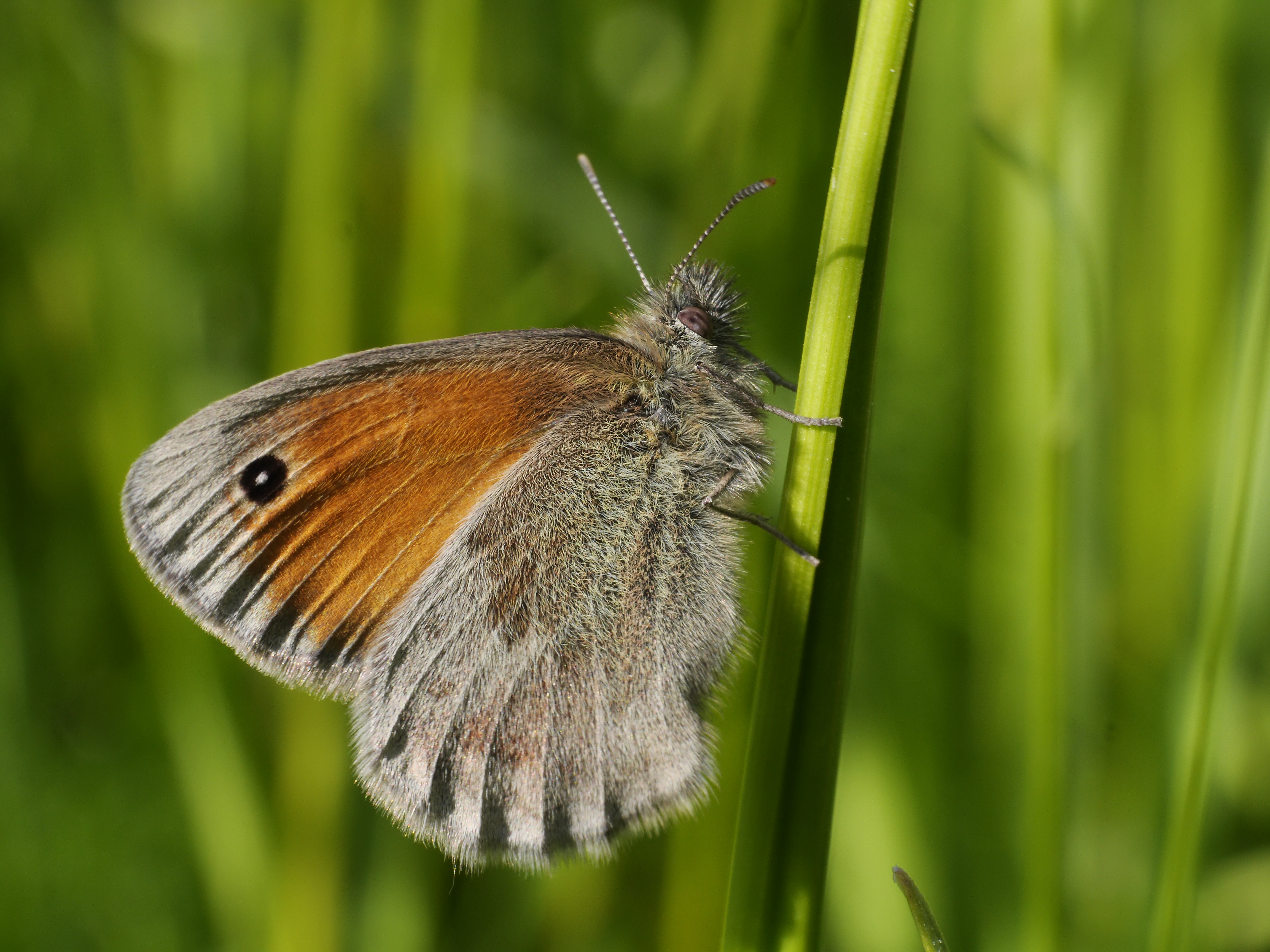 Kleines Wiesenvögelchen - Coenonympha pamphilus. Aufgenommen in Mannheim-Vogelstang, Baden-Württemberg, Deutschland.